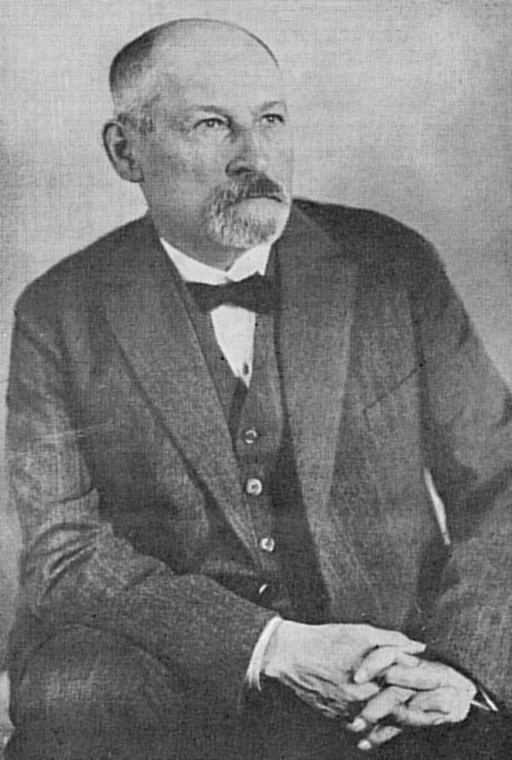 Fotografie von Max Matthes